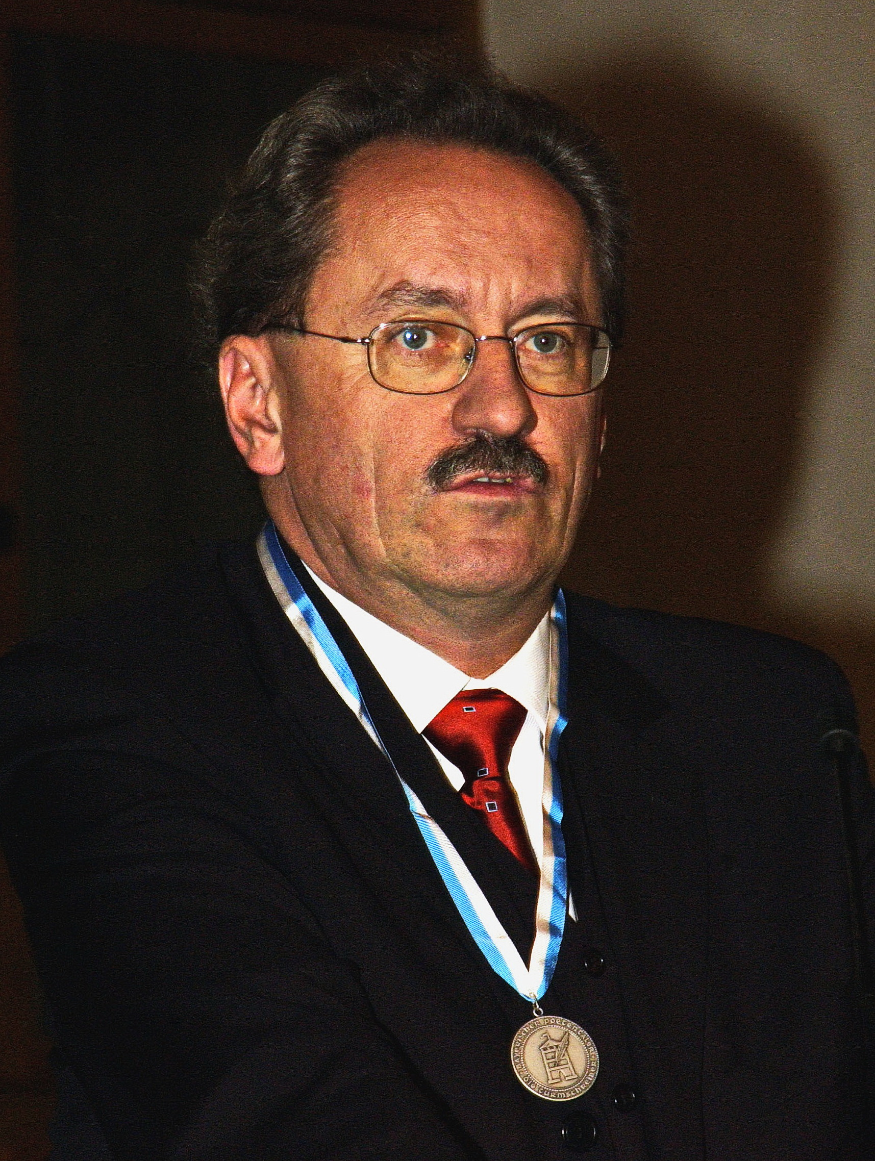 Christian Uhde, Poetentaler-Verleihung 2001